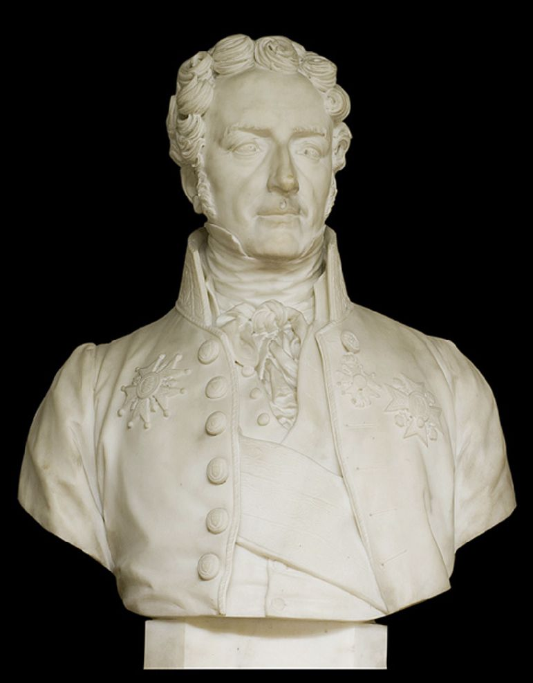 buste en marbre ; sculpteur Maggesi